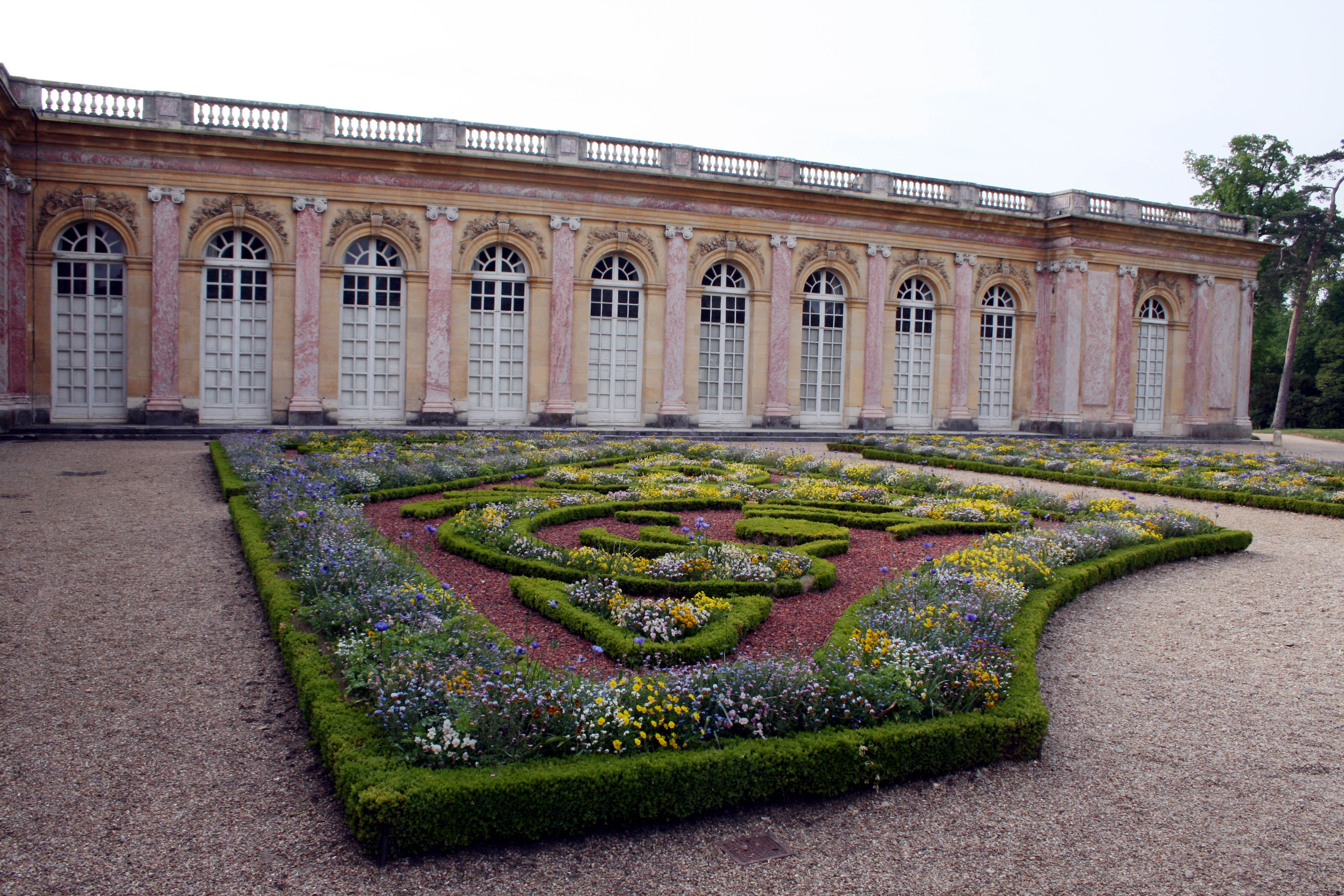 Parterre garden at Grand Trianon de Versailles.